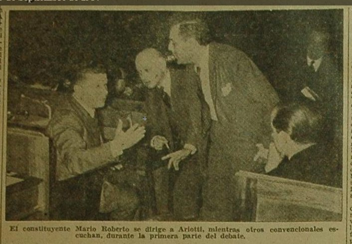 Convención Constituyente de 1957. Mario Roberto (UCRP) increpa a Enrique E. Ariotti (Unión Federal de Salta) en la sesión del 2 de septiembre.